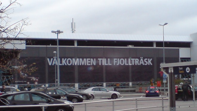 Välkomsttext utanför terminal 4 inrikes på Arlanda.